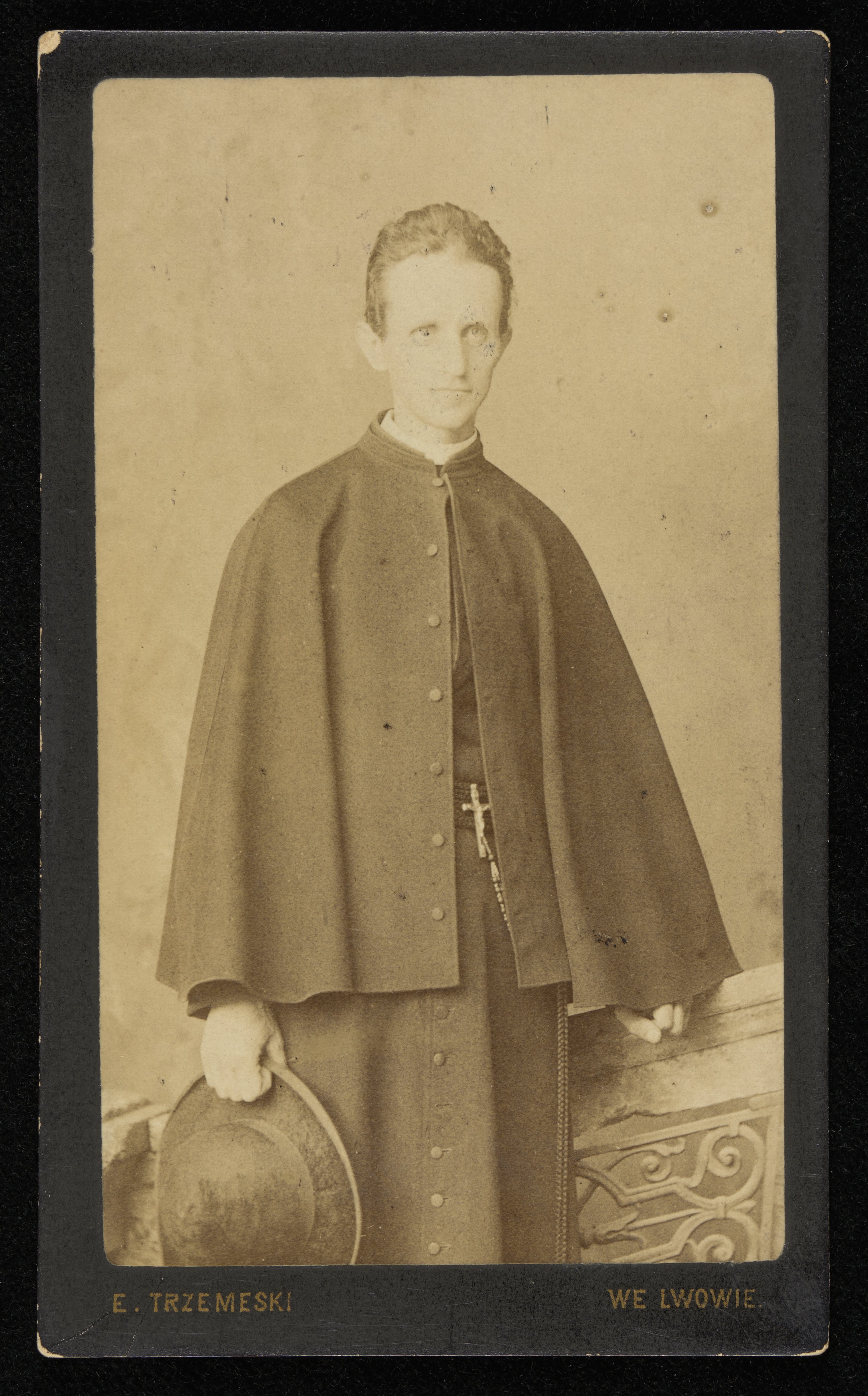 Paweł Smolikowski, po 1877 r.